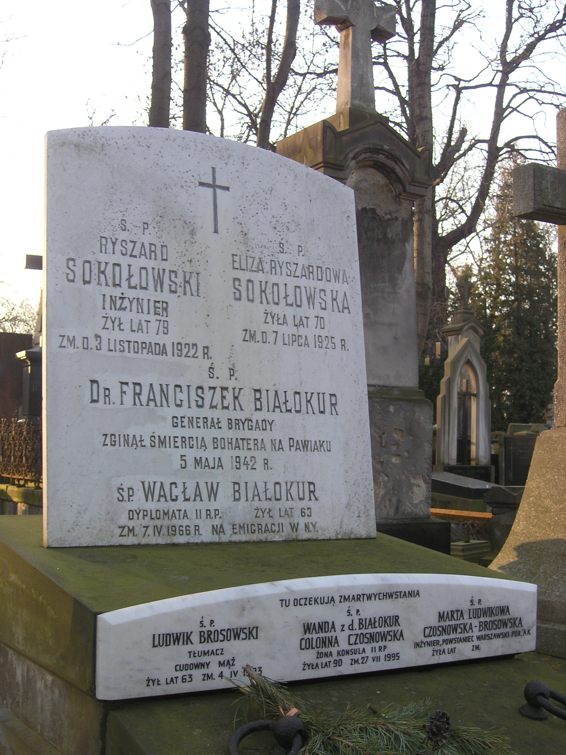 Grób generała Franciszka Białokura na Starych Powązkach w Warszawie (stan na marzec 2012)